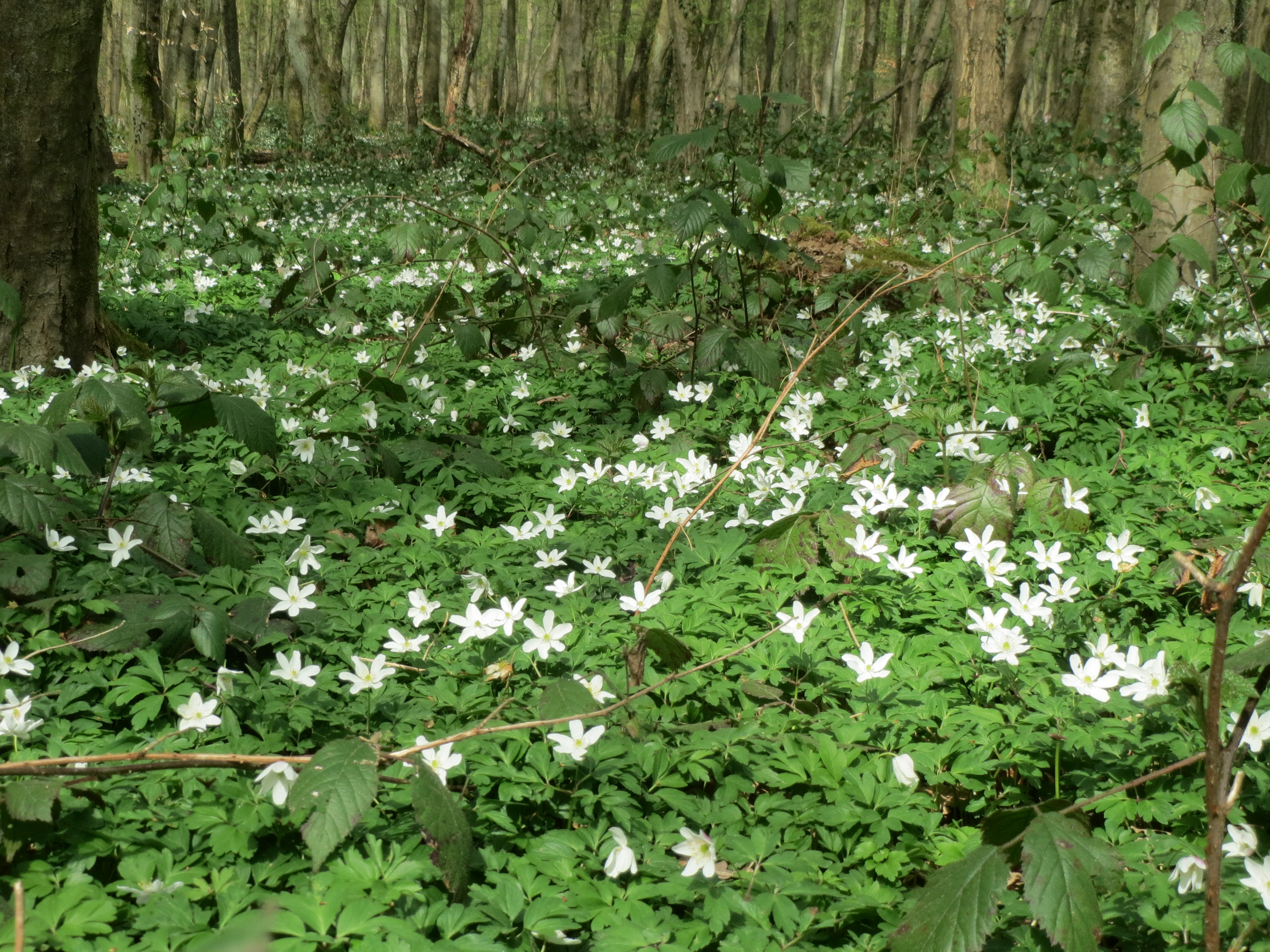 Buschwindröschen (Anemone nemorosa) im Simbachtal